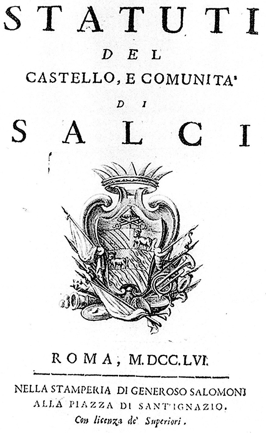 Statuti del ducato di Salci (Umbria), 1756